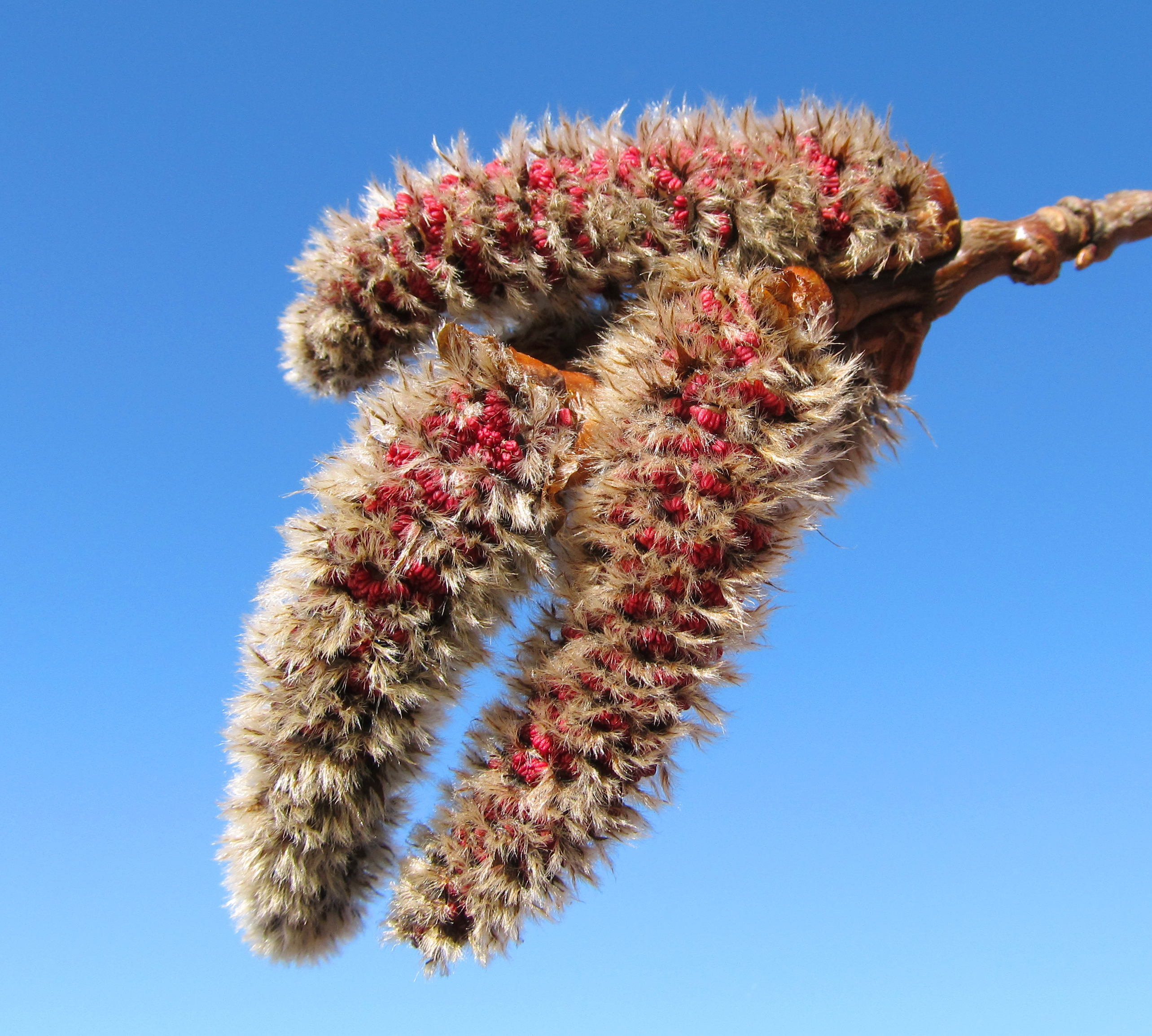 Populus tremula Осина Сережки весной